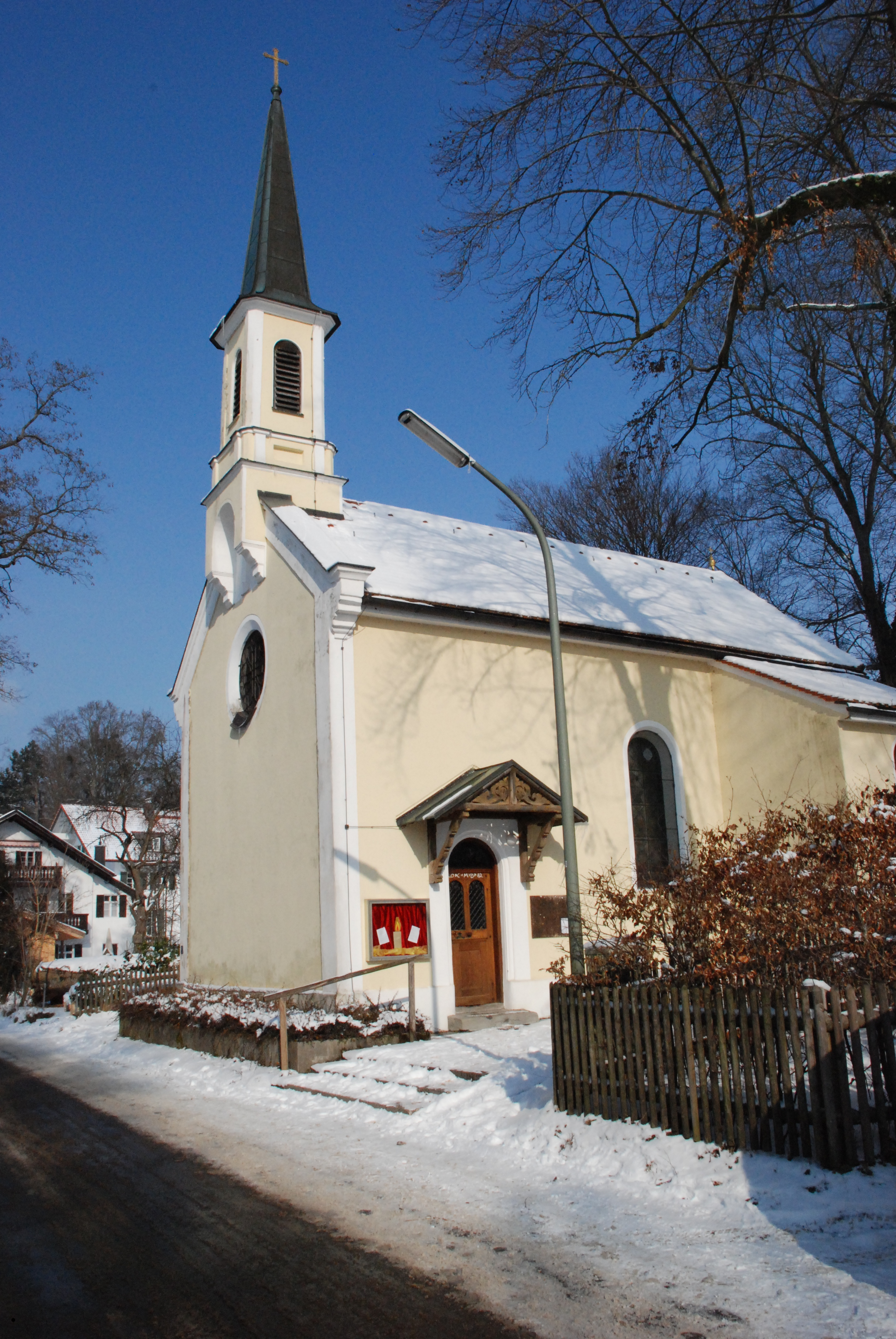 Muttergotteskapelle an der Seeuferstraße 23 in Ambach, Gemeinde Münsing, Landkreis Bad Tölz-Wolfratshausen, Regierungsbezirk Oberbayern, Bayern. Als Baudenkmal in der Bayerischen Denkmalliste aufgeführt. Laut Denkmalliste erbaut 1873/1874.